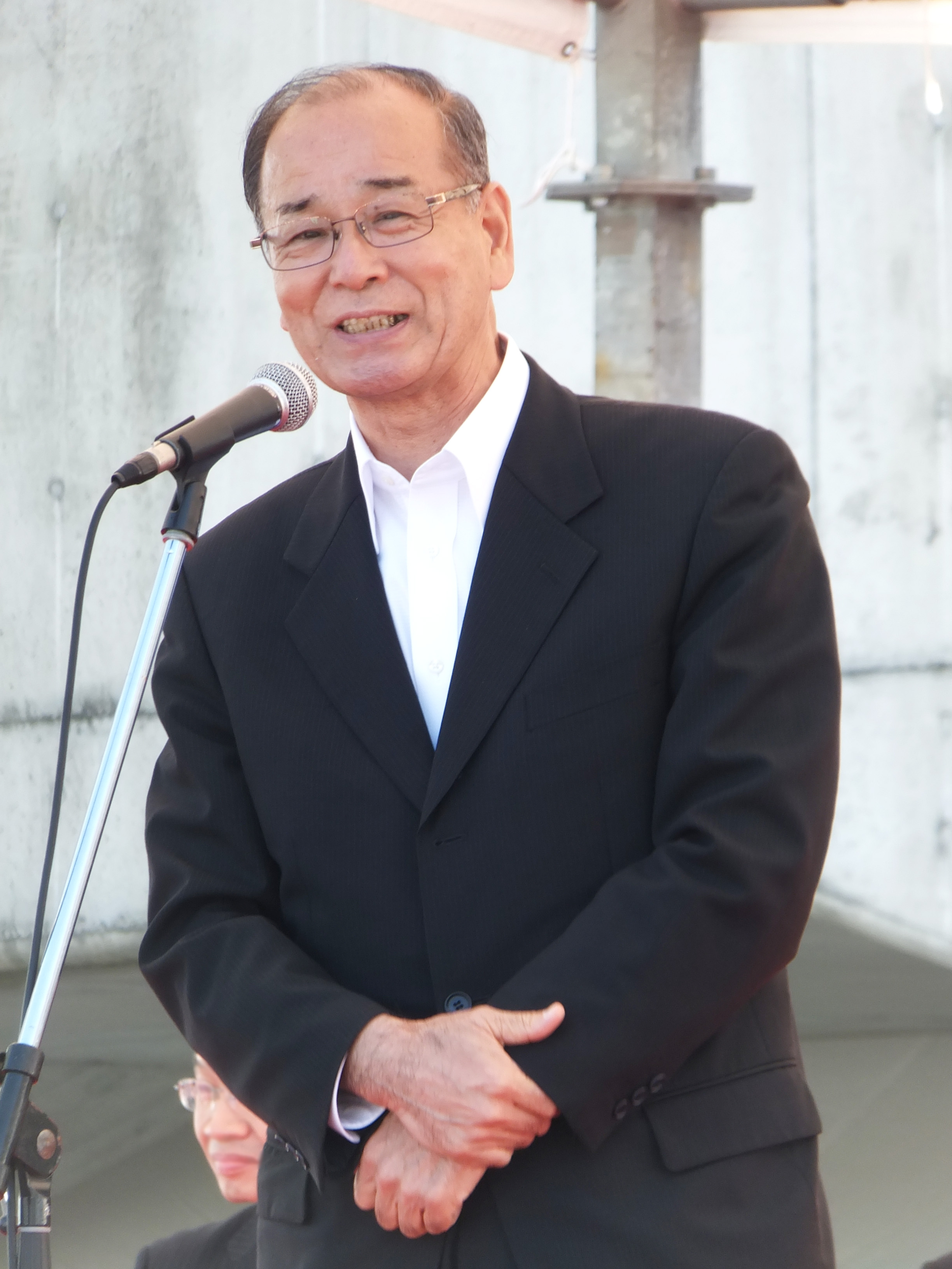 鈴木克昌。国道23号豊橋バイパス（前芝IC - 豊川為当IC）開通記念イベントにて。2012年10月7日